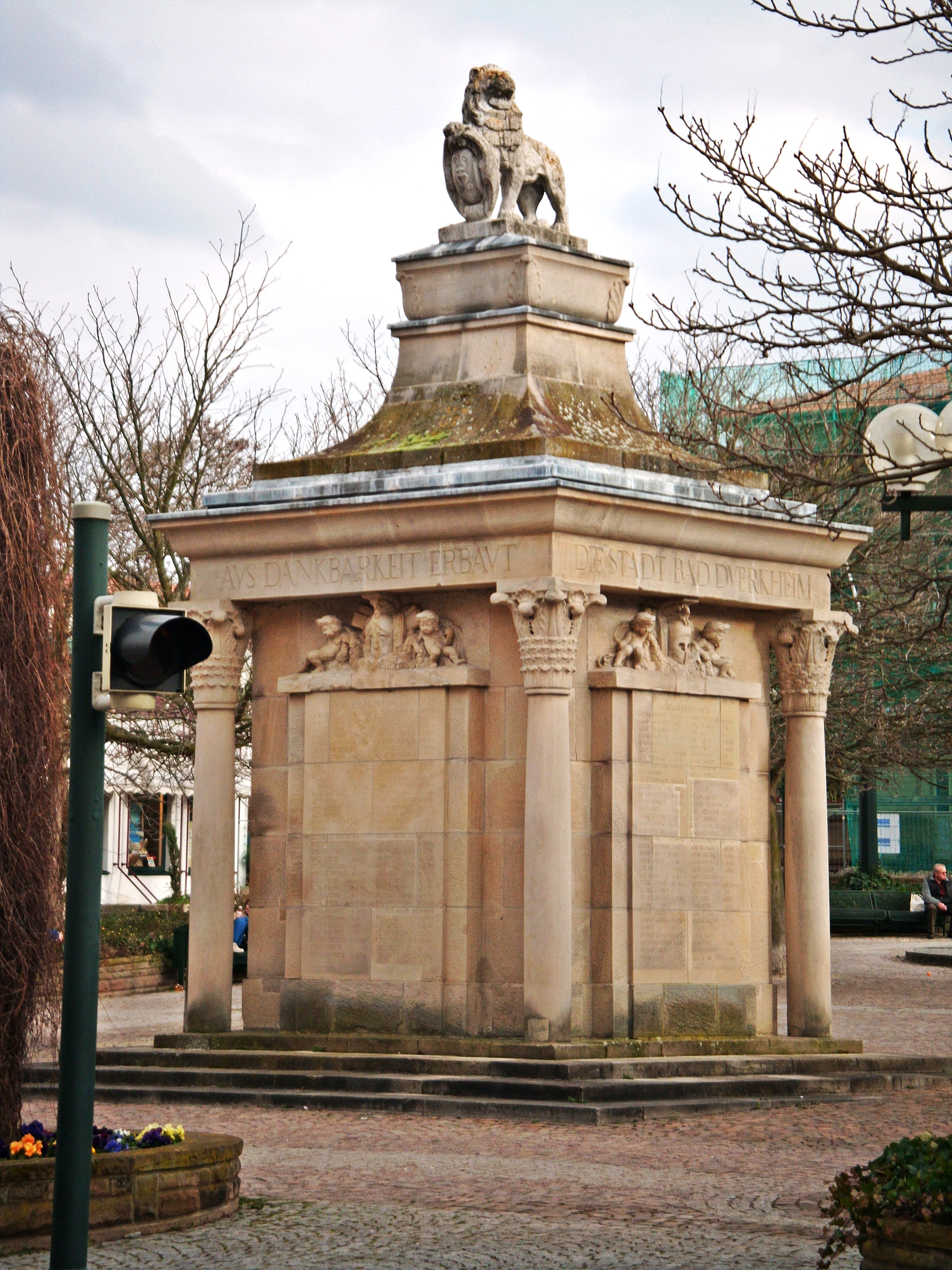 Bad Dürkheim, Kriegerdenkmal 1870-71, von Oswald Bieber, 1911